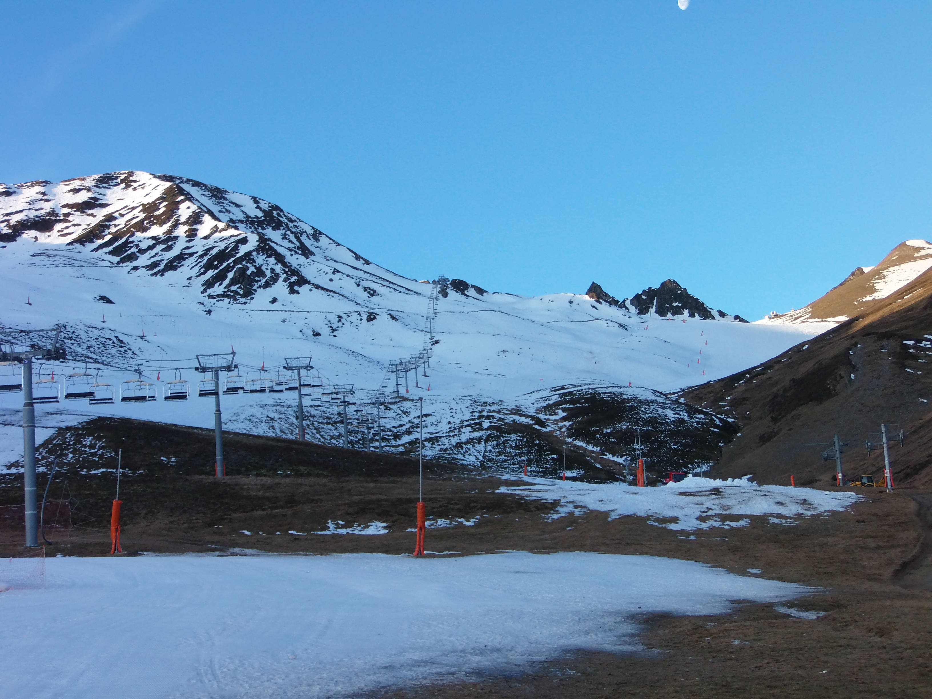 Vue sur un paysage des Pyrénées, station des Agudes (Haute-Garonne, France) située à 1 600 mètres d'altitude à proximité du col de Peyresourd. Peyragudes, station de sports d'hiver réunissant Peyresourde (versant Hautes-Pyrénées) et des Agudes (versant Haute-Garonne).